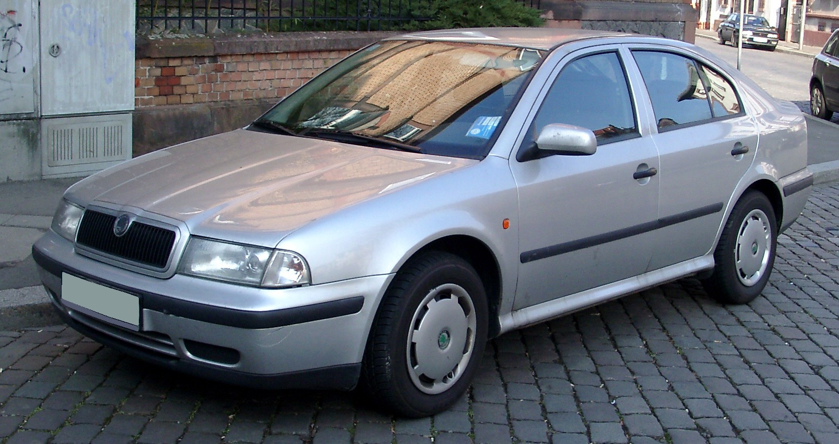 Škoda Octavia, 1. Generation